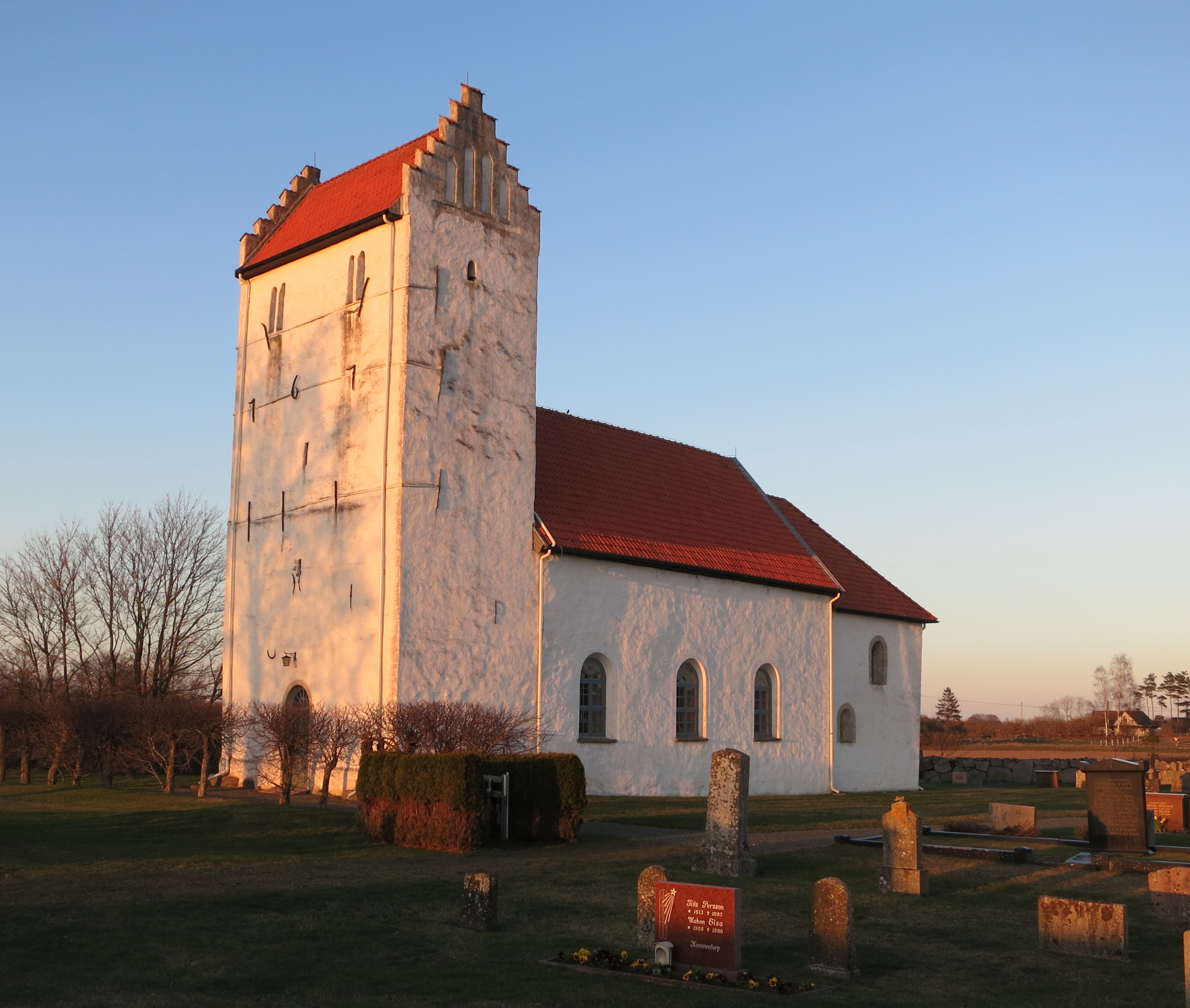 Lyngsjö kyrka, mars 2014